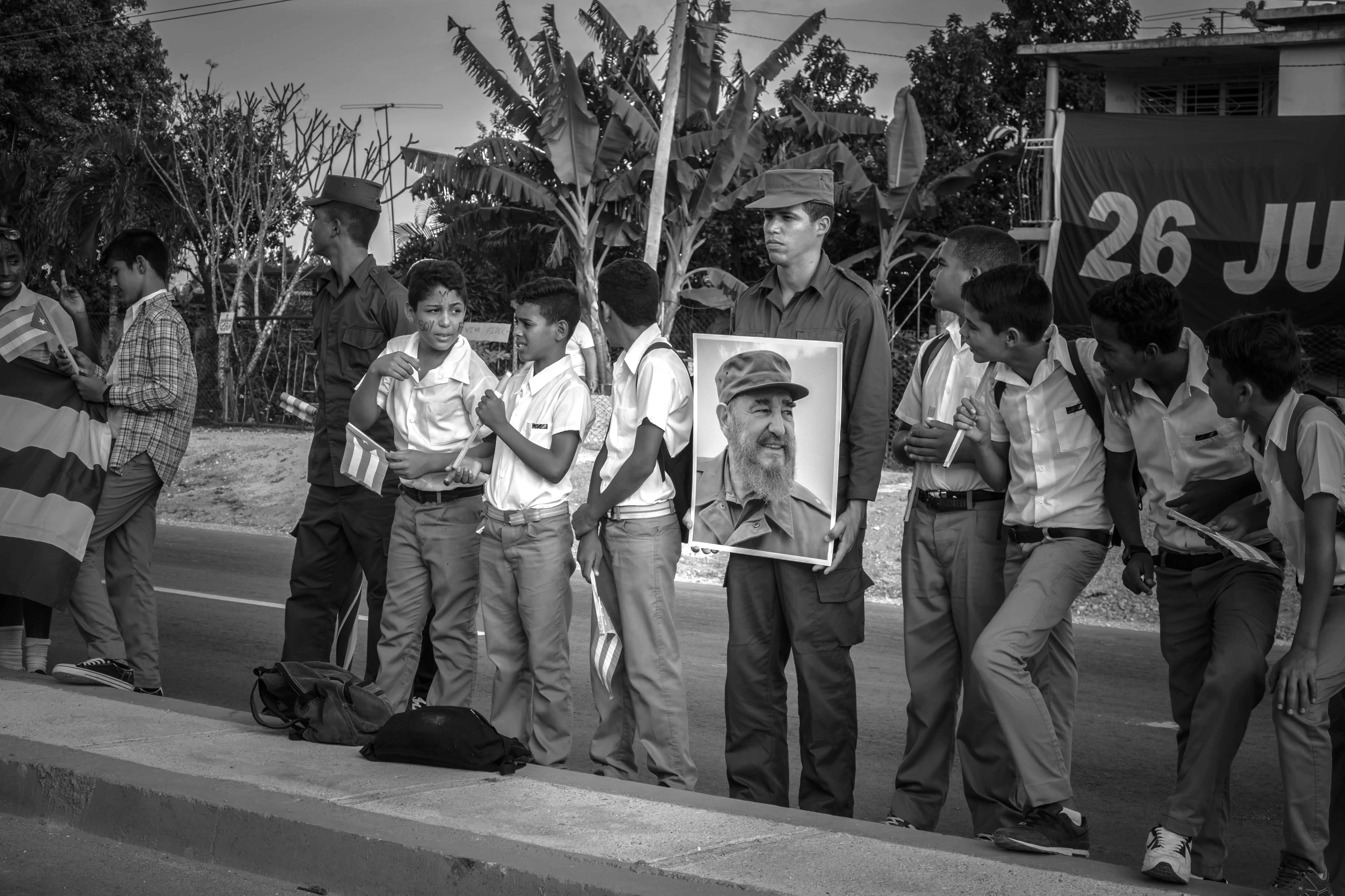 Le 2 décembre 2016, près d'Holguin, en attendant le passage du cortège funèbre de Fidel Castro en route vers Santiago.